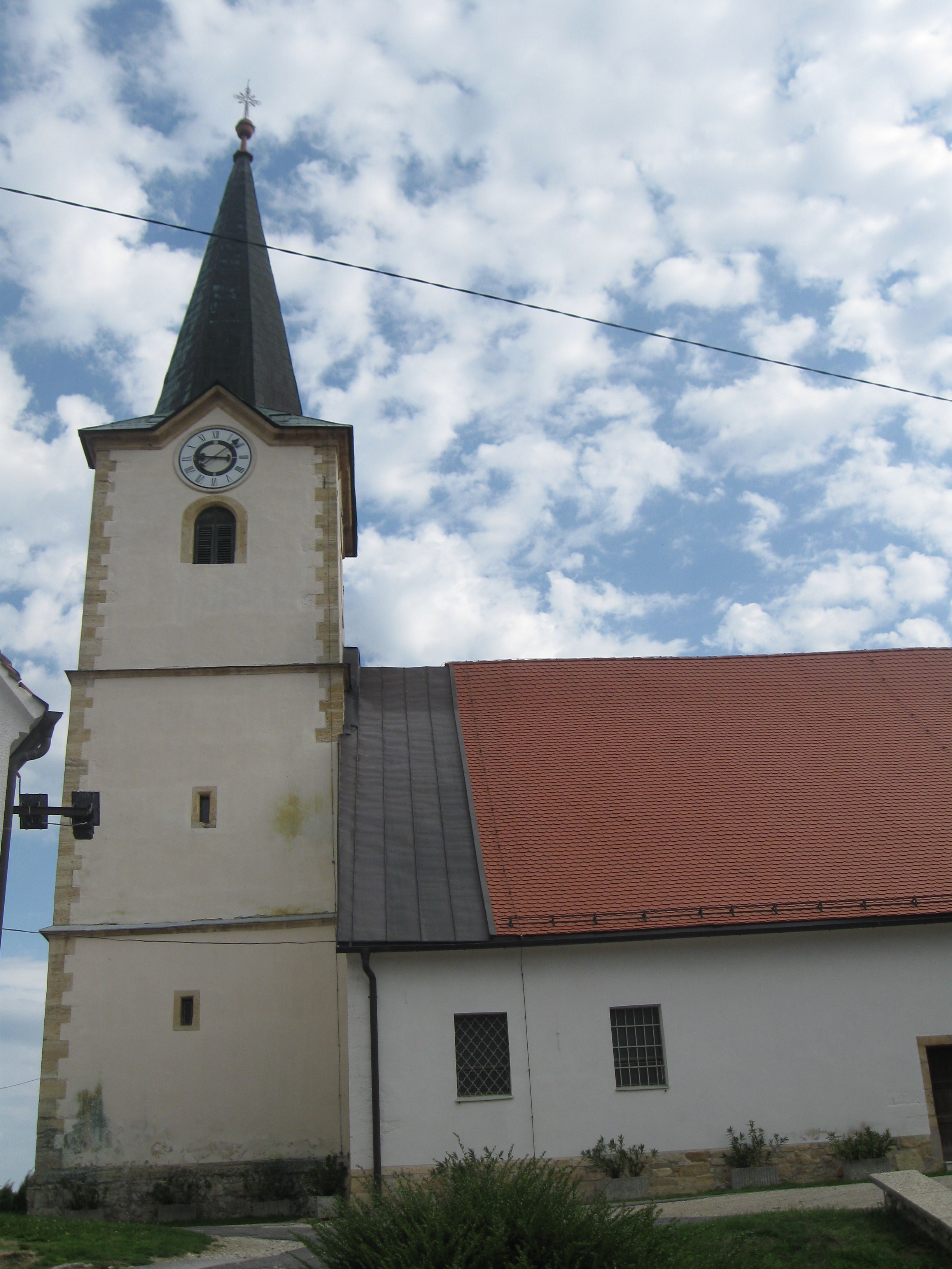 Cerkev sv. Antona je bila zgrajena leta 1546 z masivnim zvonikom, kamnitimi šivanimi robovi, gotskim prezbiterijem, baročno kapelo in novejšim prizidkom iz 20. stol.